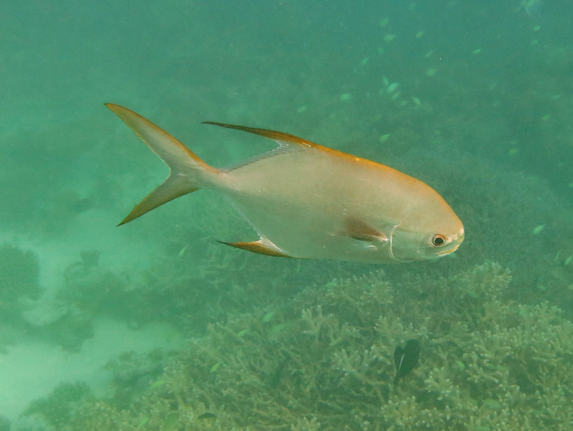 Un pompaneau lune (Trachinotus blochii) aux Maldives (Landaagiraavaru, atoll de Baa).